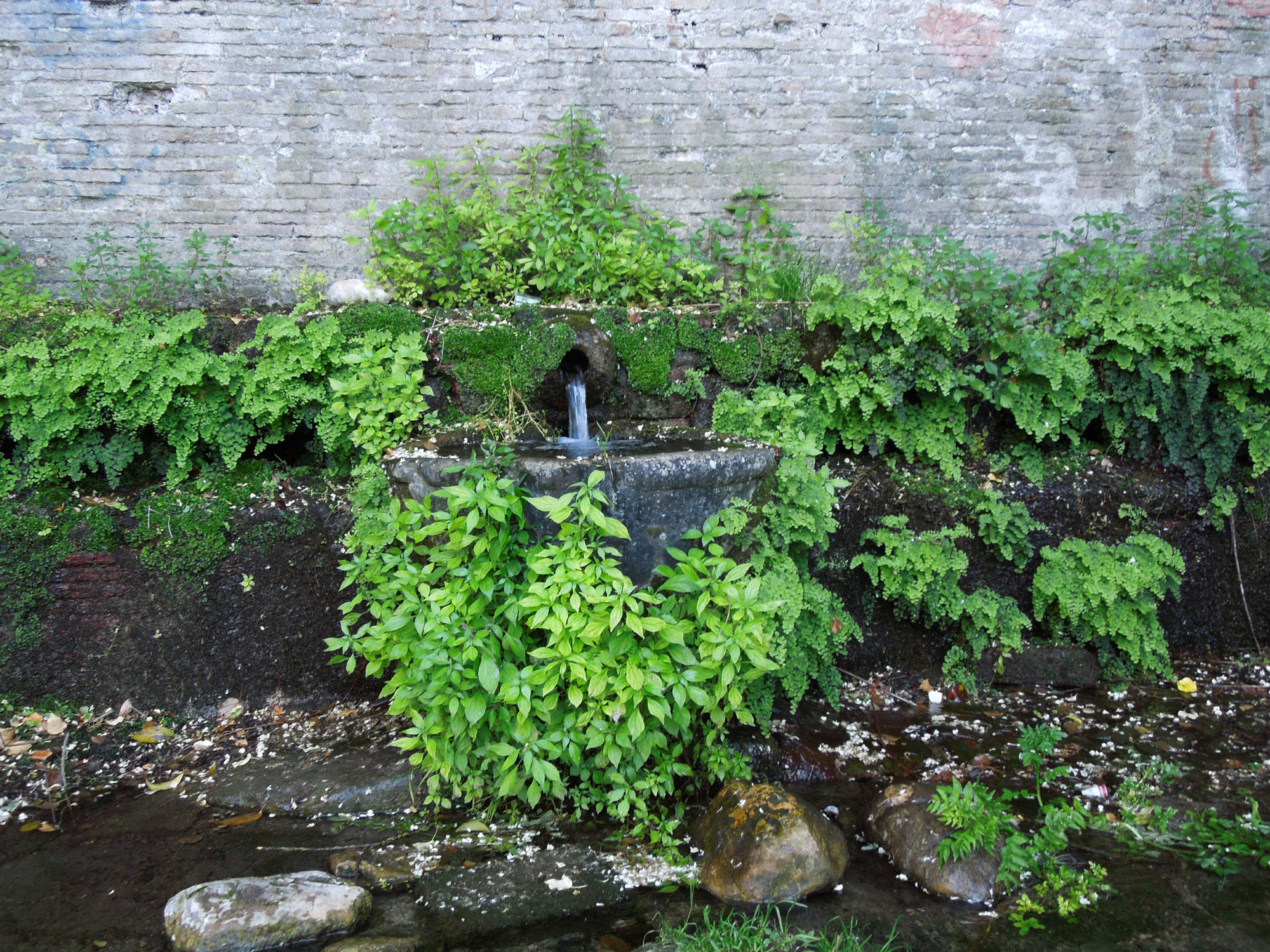 Fonte della Noce di Teramo, particolare del bacino circolare sulla parete di fondo della fontana.